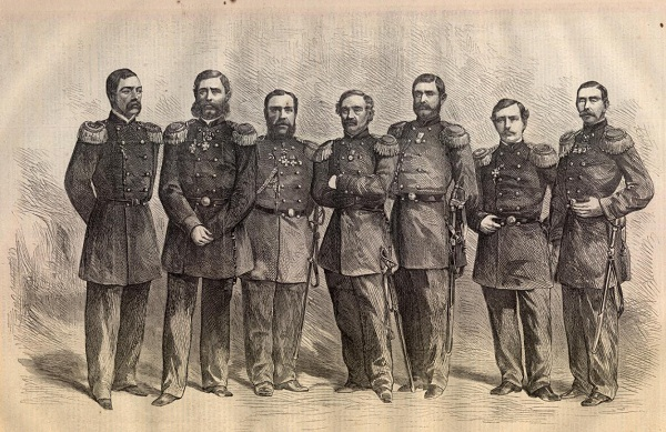 Капитаны_Атлантической_эскадры. Капитаны экспедиции русского флота к берегам Северной Америки. Слева направо: П. А. Зеленой (клипер «Алмаз»), И. И. Бутаков (фрегат «Ослябя»), М. Я. Федоровский (фрегат «Александр Невский»), адмирал С. С. Лесовский (командир эскадры), Н. В. Копытов (фрегат «Пересвет»), О. К. Кремер, (корвет «Витязь»), Р. А. Лунд (корвет «Варяг»)Литография неизвестного автора по фотографии “Admiral Lessofsky and his Captains”, сделанной Mathew Brady в его салоне в Нью-Йорке в 1863 году